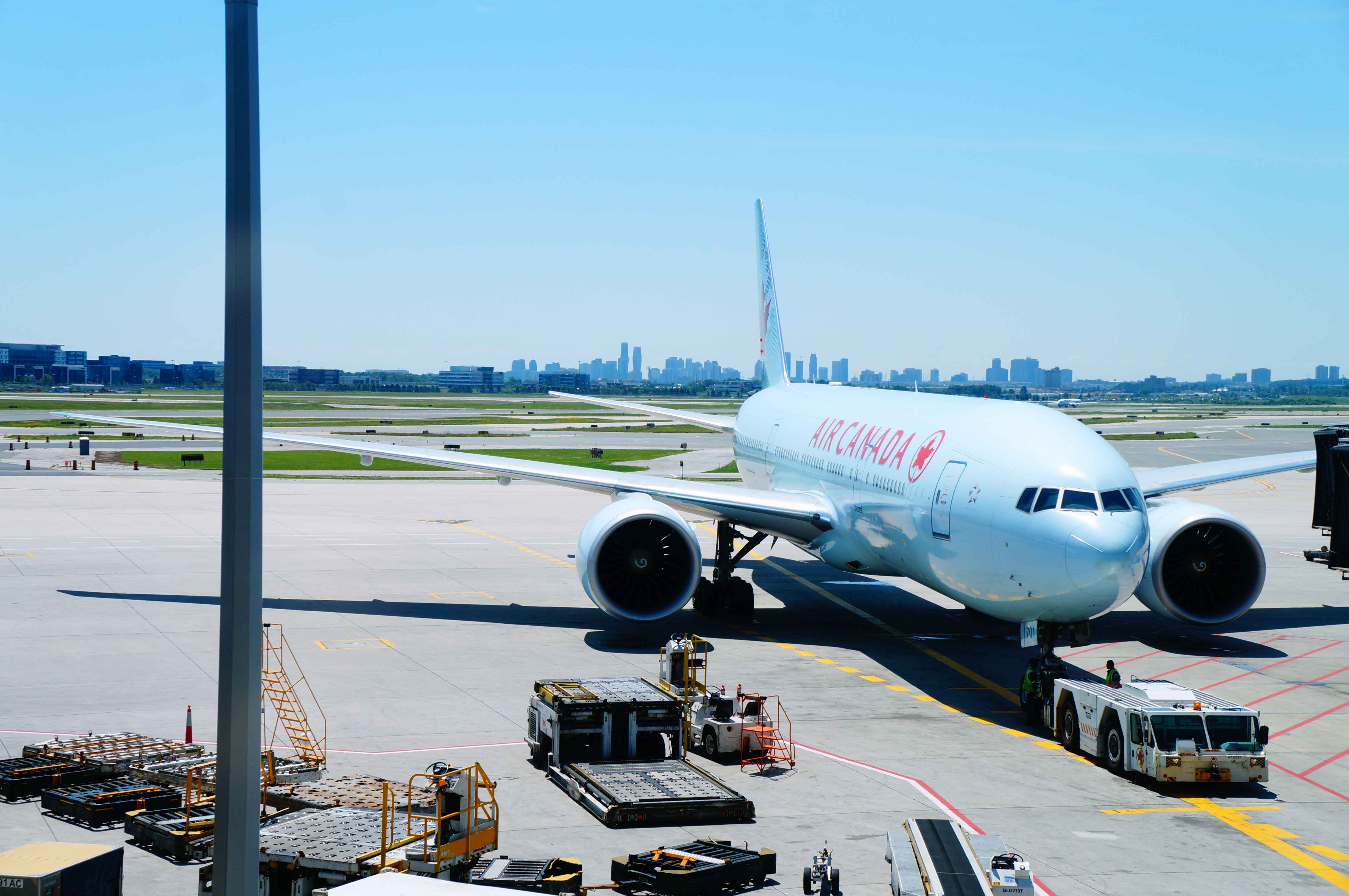 Air Canada B777-200LR